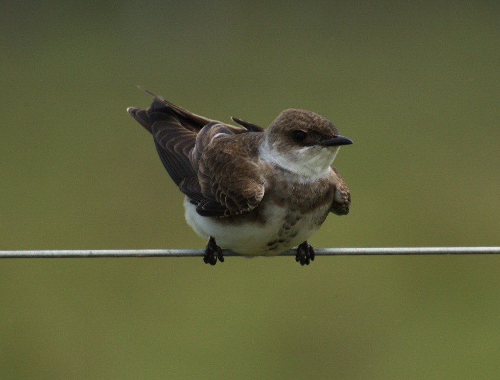 Progne tapera golondrina parda grande